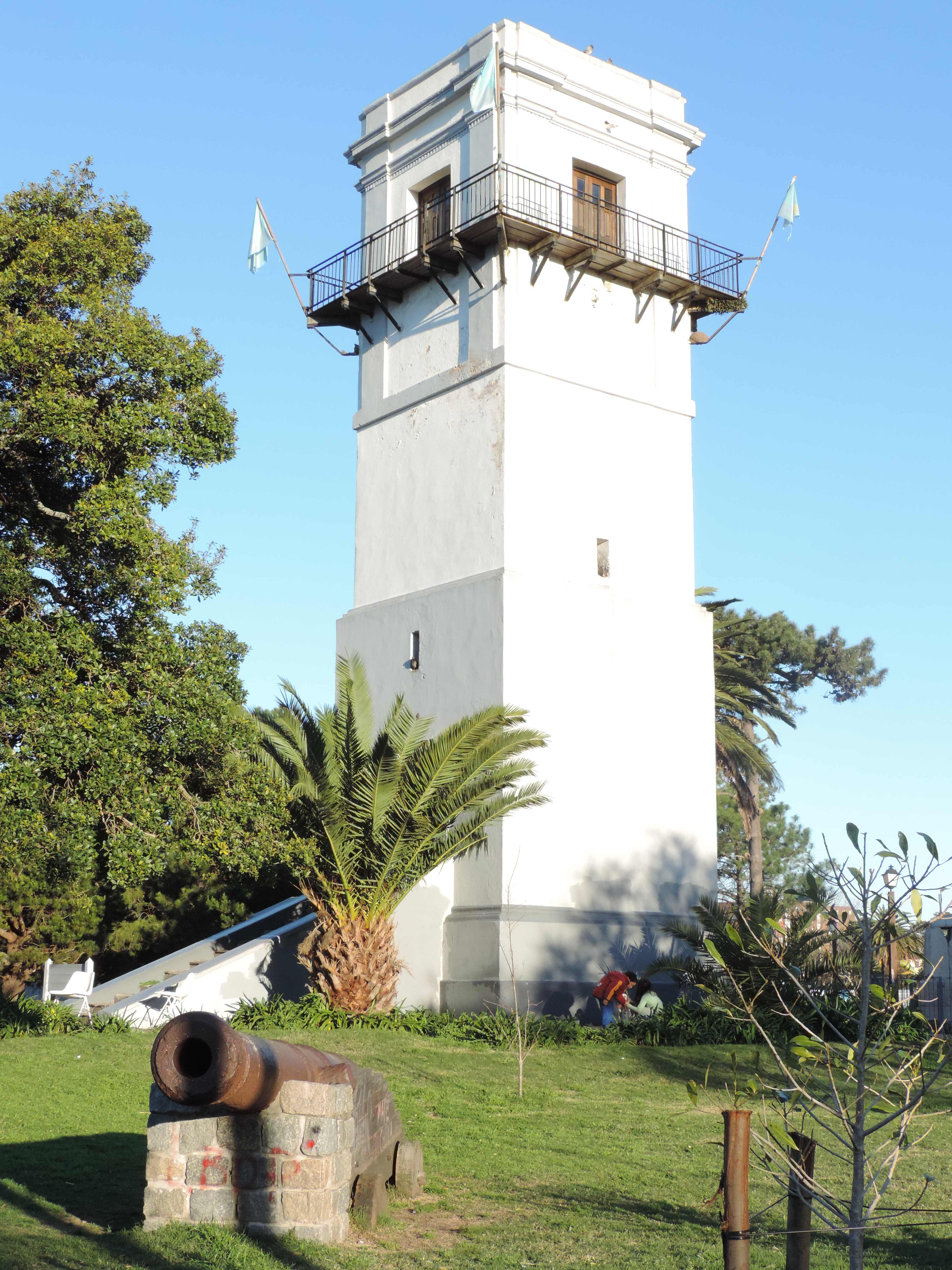 Torre del Vigía. Ubicada en el departamento de Maldonado